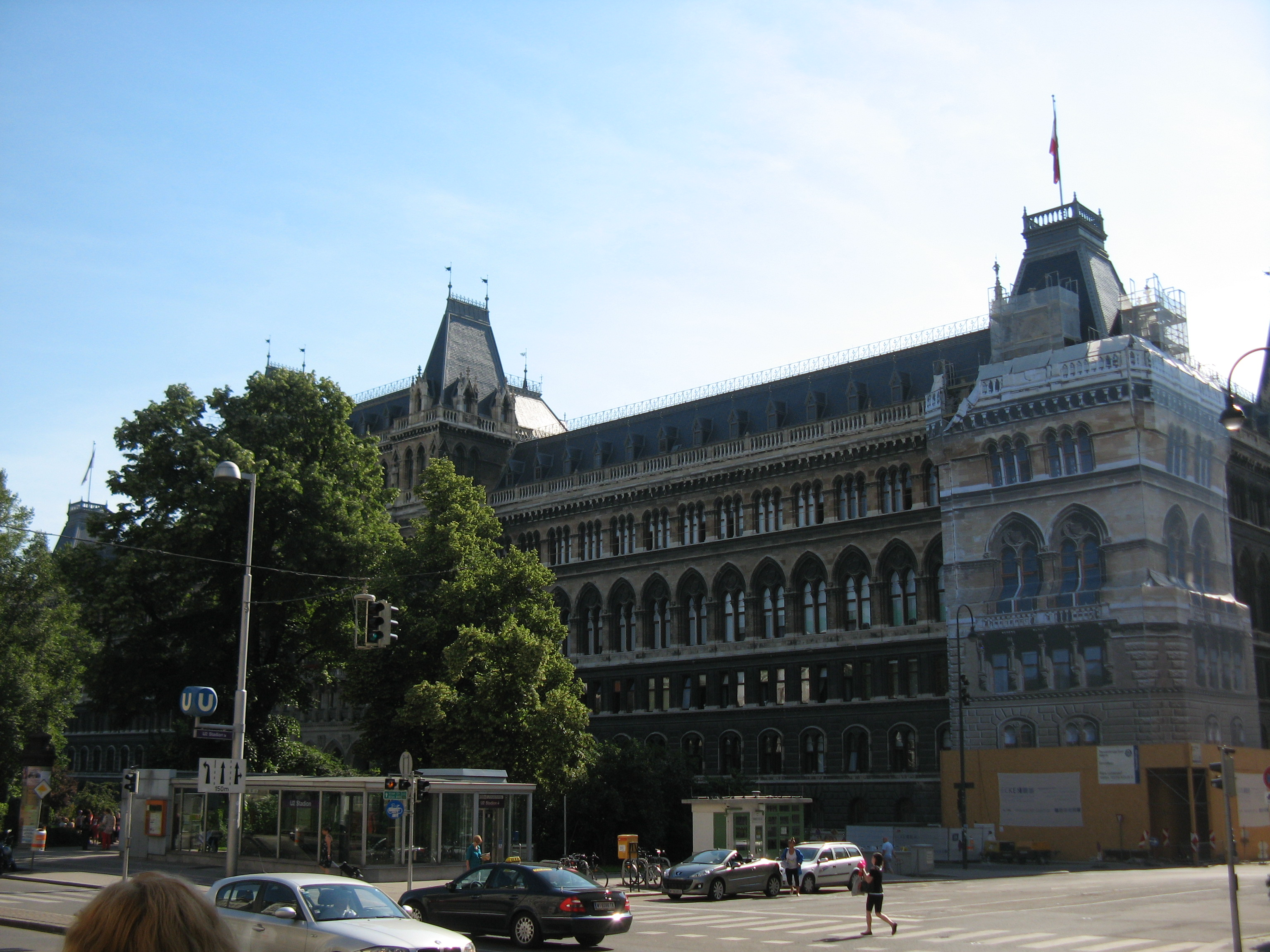 Rückseite des Wiener Rathauses, Friedrich-Schmidt-Platz 1, Wien-Innere Stadt